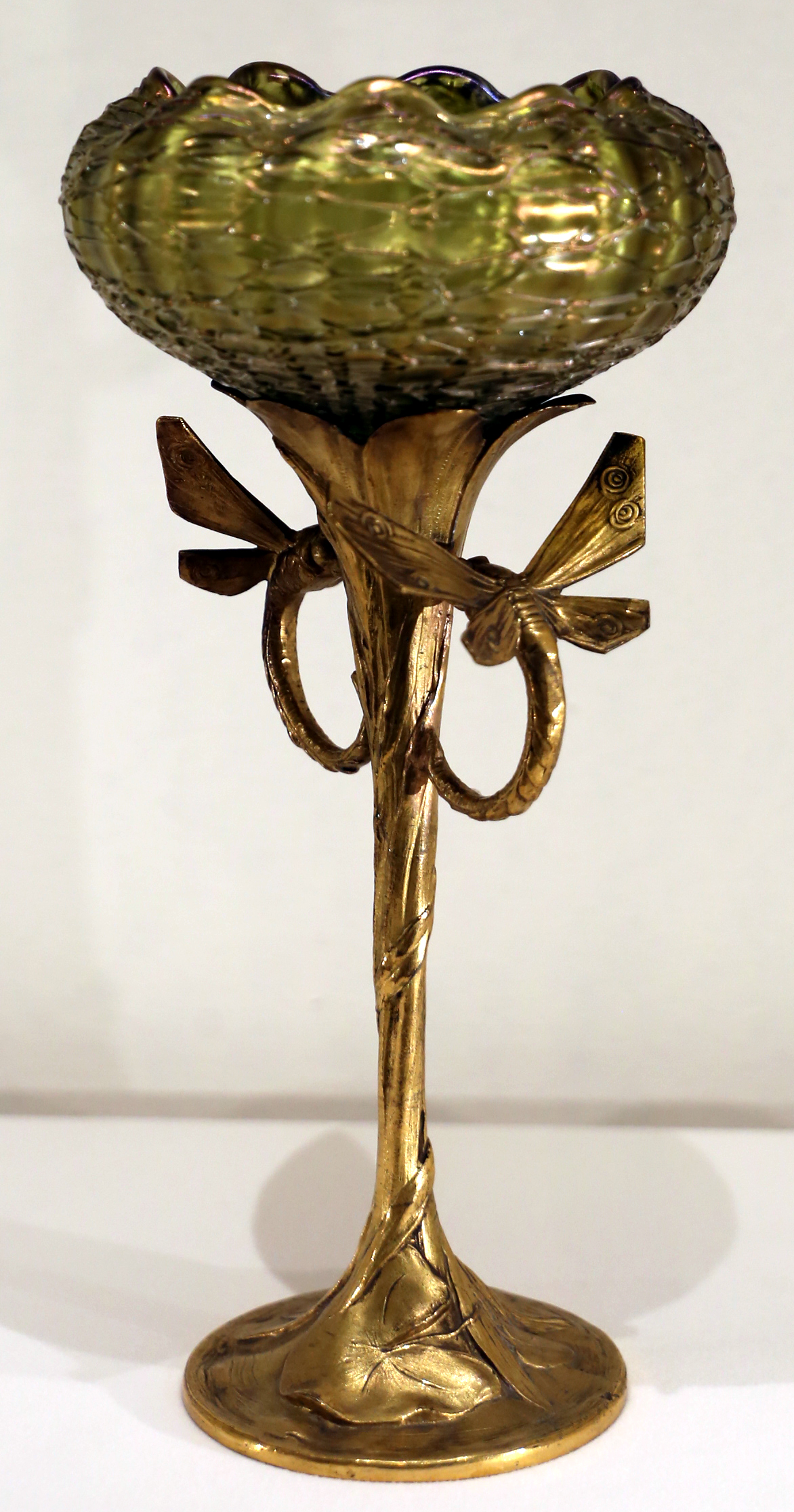 Miramare This is a photo of a monument which is part of cultural heritage of Italy. The authorisation for taking photos of this object was provided by the World Wide Fund for Nature Italy.